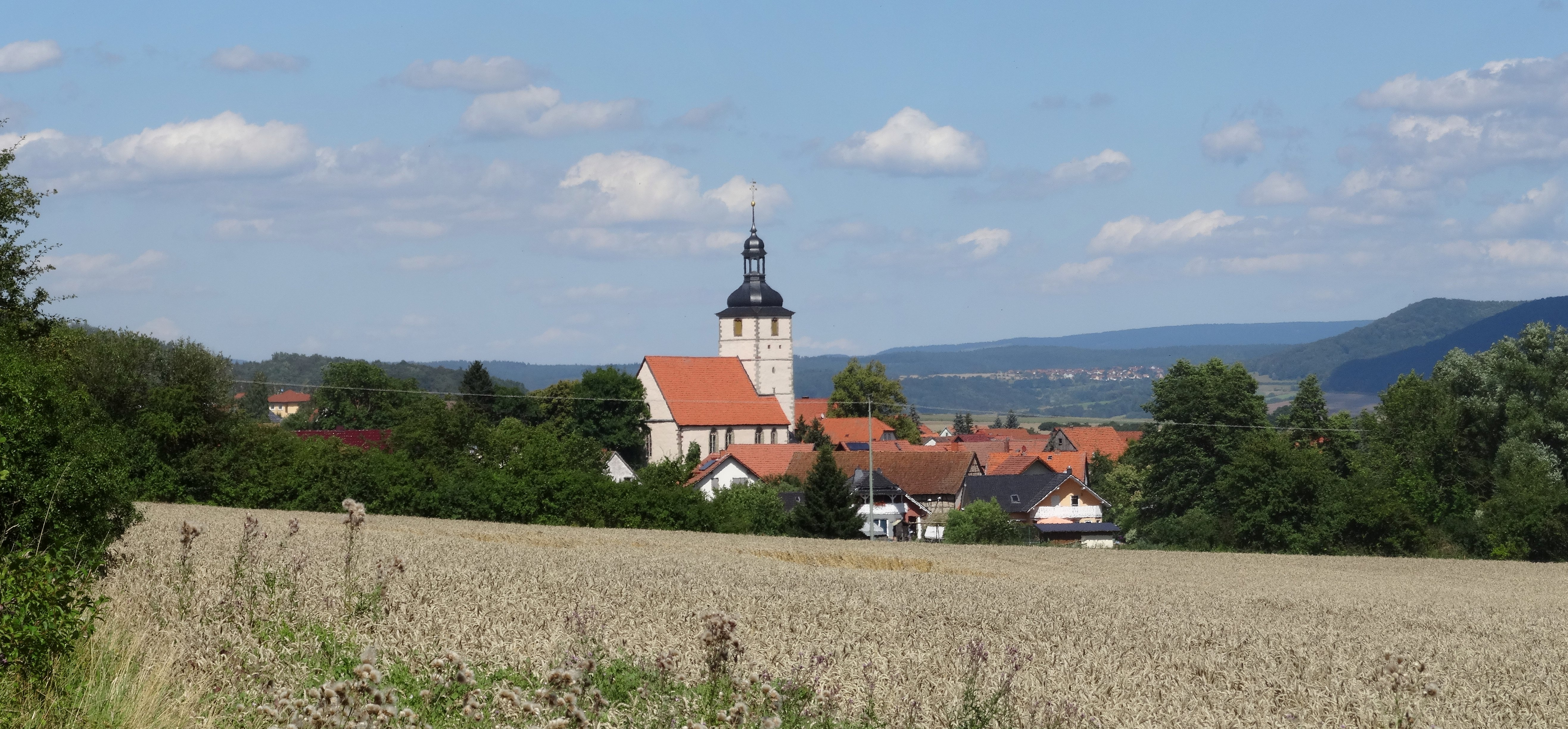 Herpf, Ansicht von Westen